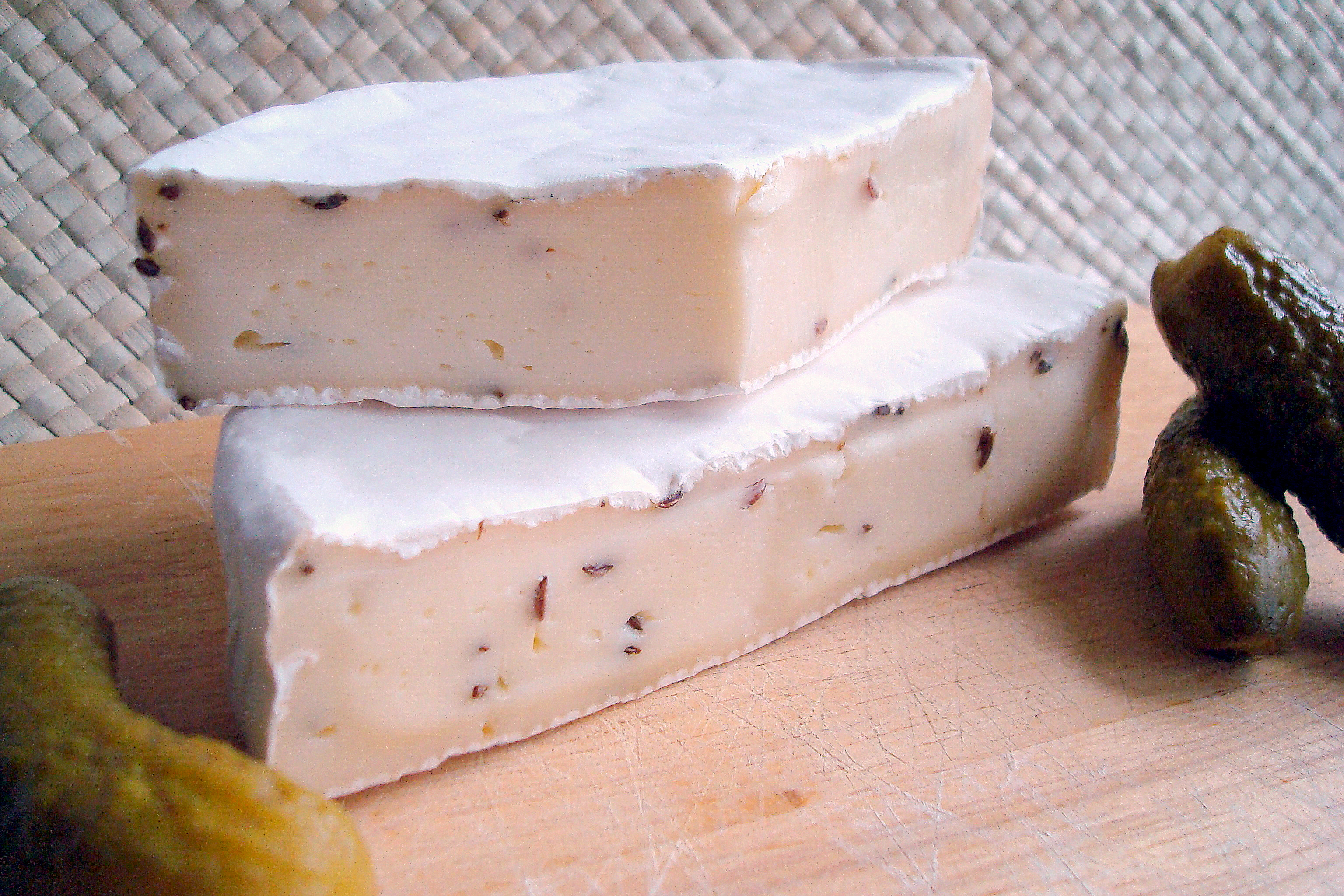 Altenburger Ziegenkäse mit Cornichons